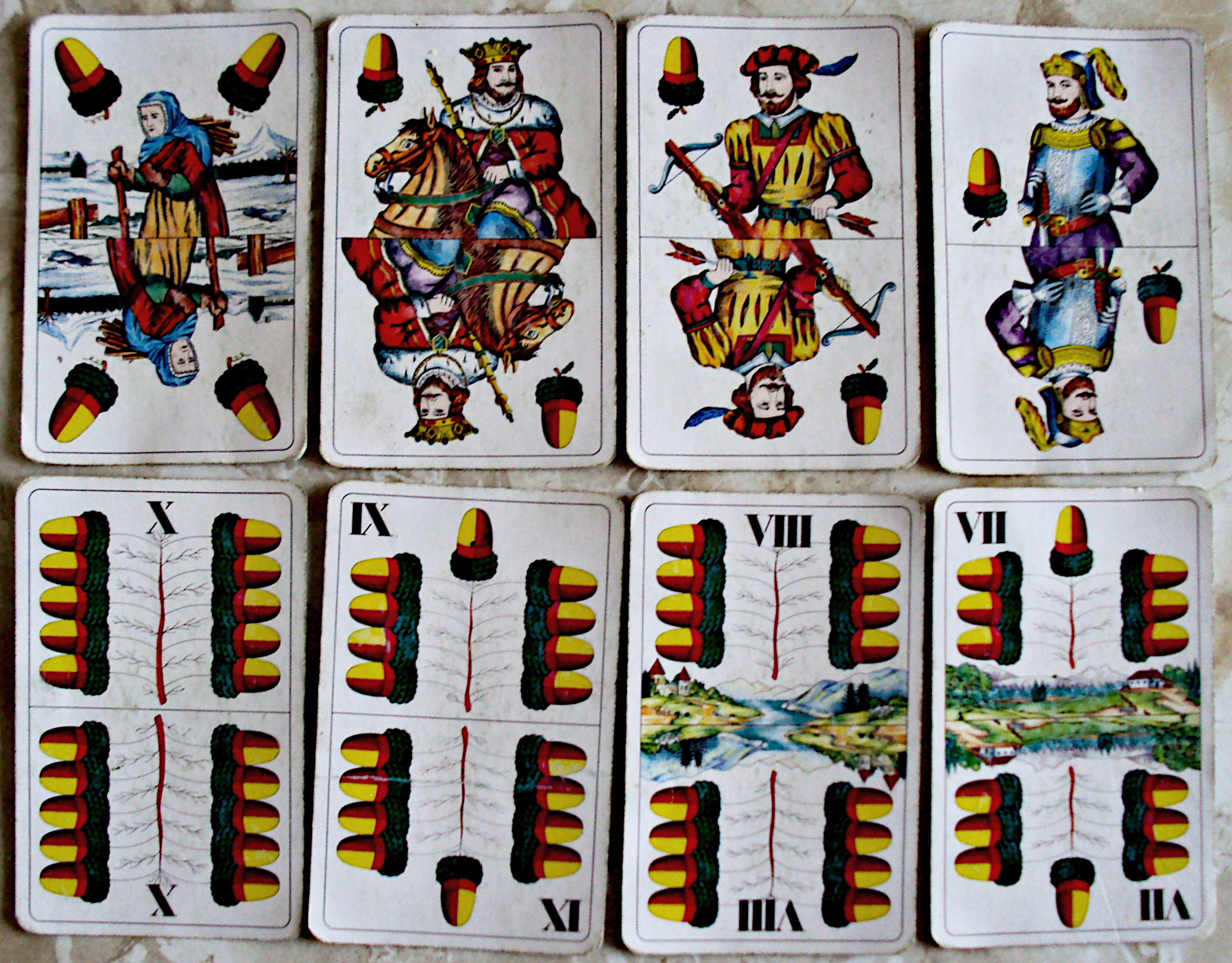 Žaludy na německých kartách